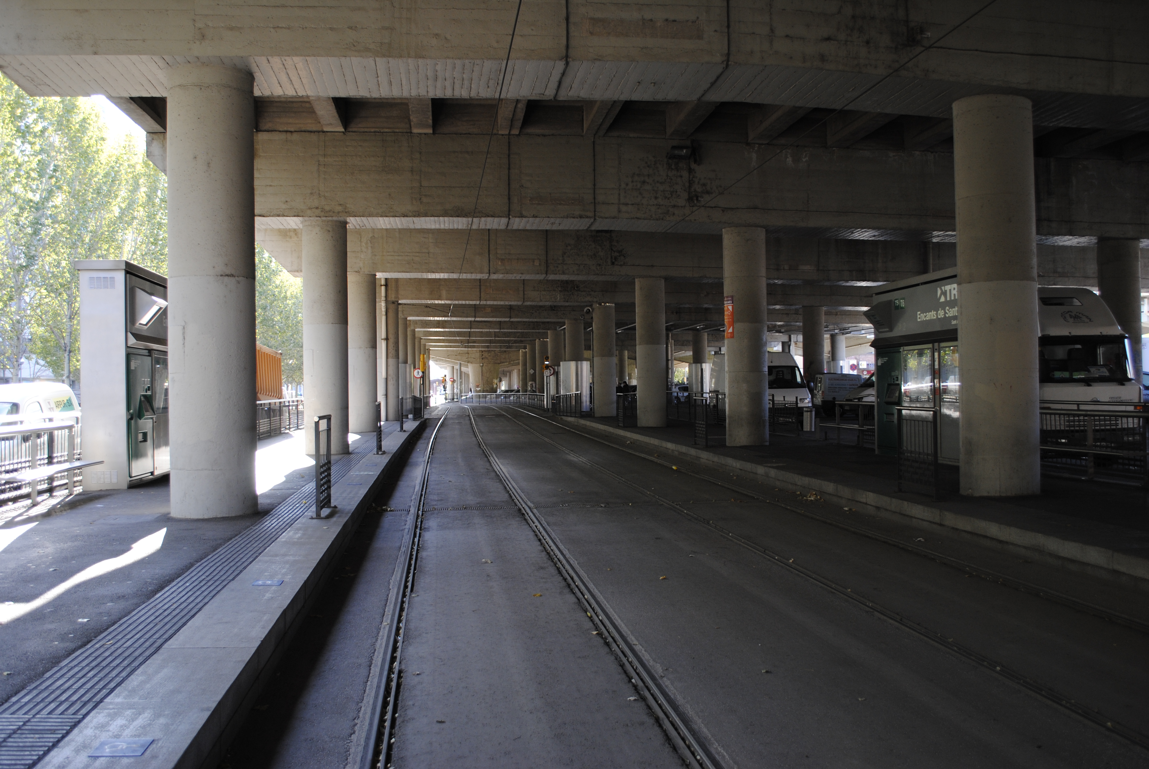 Parada de l'estació de Trambesòs Encants de Sant Adrià